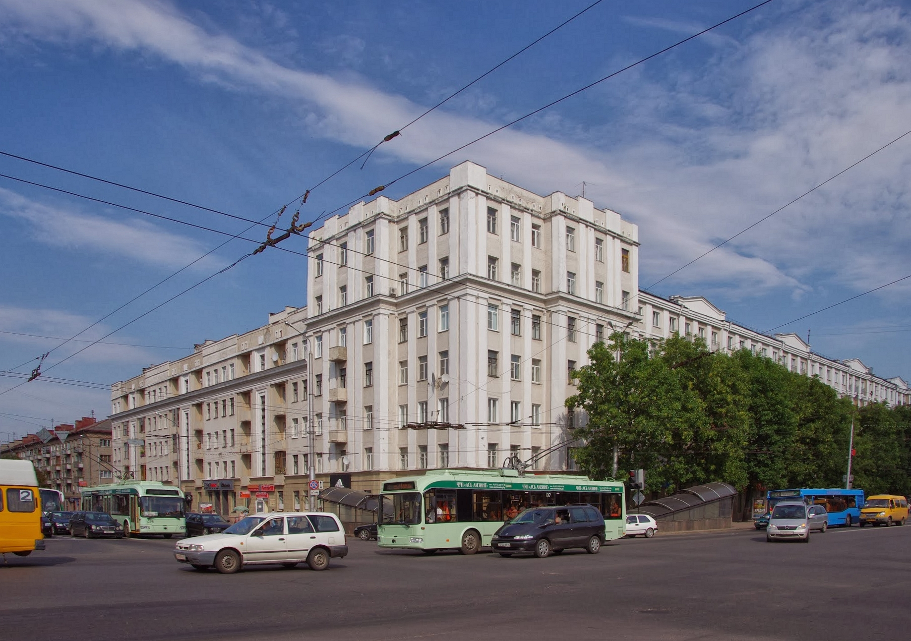 Mogilev, Belarus